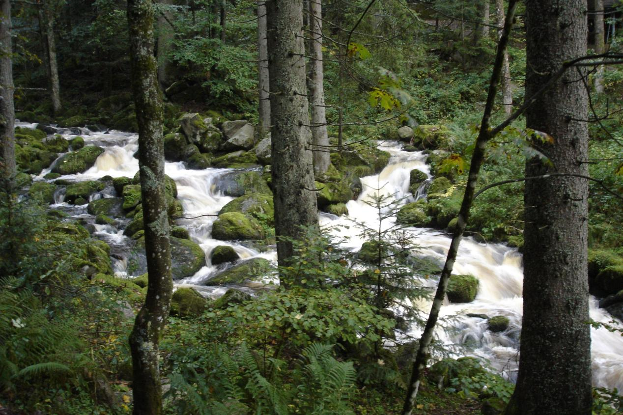 Triberg waterfalls